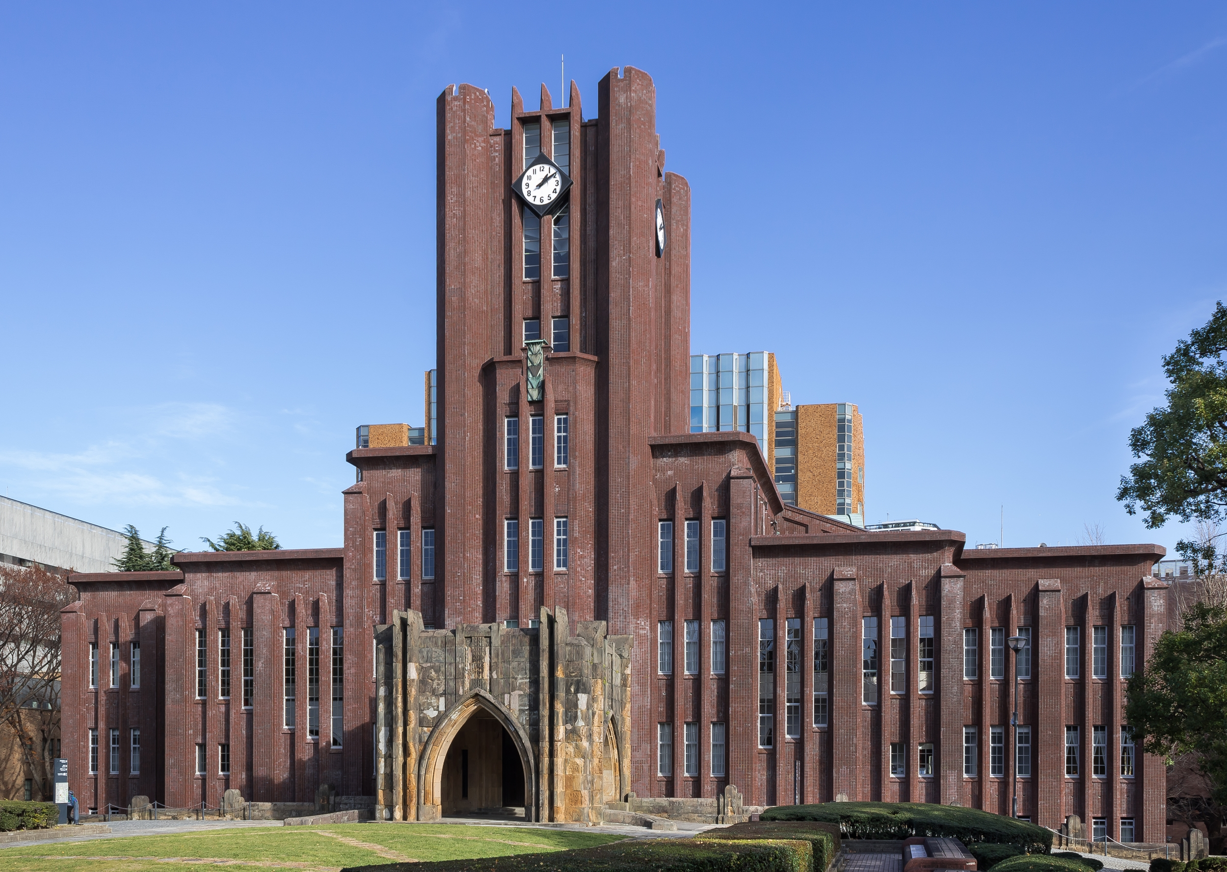 東京大学安田講堂、内田祥三（1925年）。